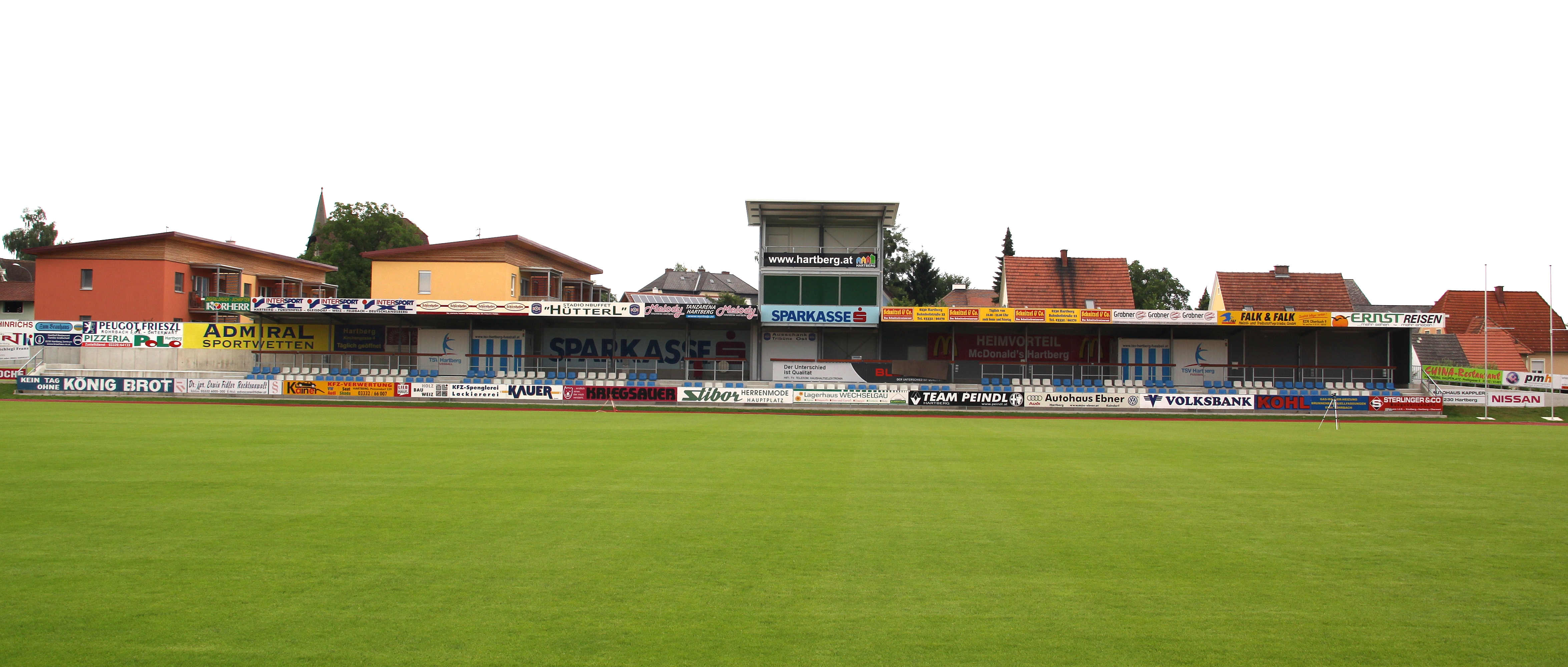 Stadion Hartberg, Gegentribüne mit TV-Turm – Heimstätte des TSV Hartberg (österreichische Erste Liga)